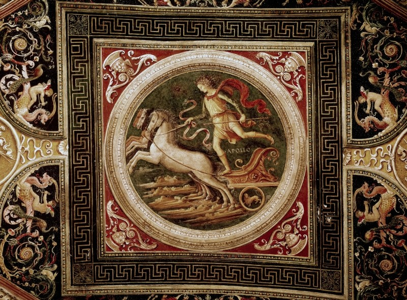 PERUGINO, Pietro Apollo Fresco, Collegio del Cambio, Perugia